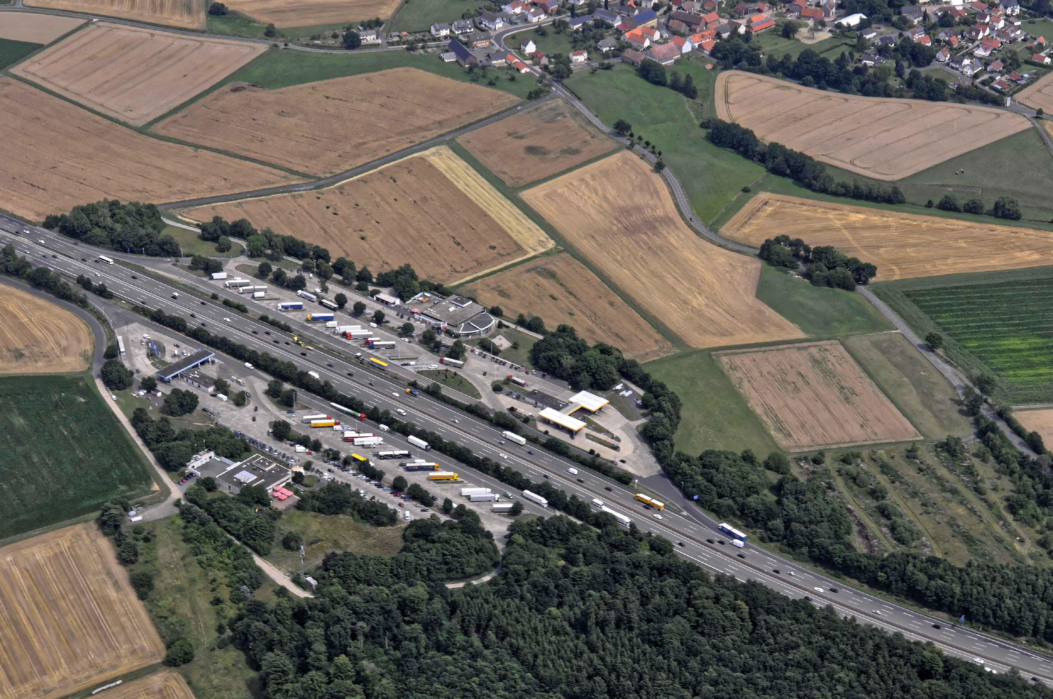 Bilder vom Flug Nordholz-Hammelburg 2015: Autobahnraststätte Hasselberg an der A 7 bei Oberbeisheim. Oben Teil von Oberbeisheim.